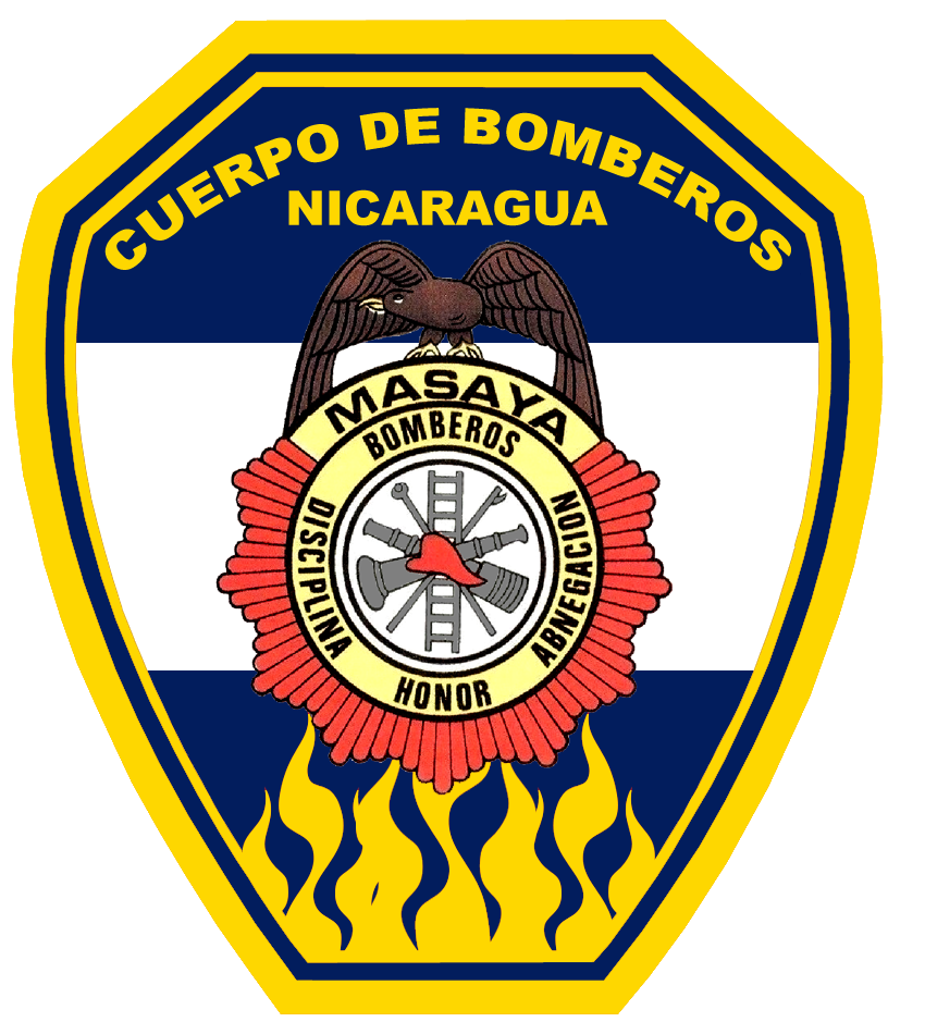 Emblema Oficial del Benemérito Cuerpo de Bomberos de Masaya